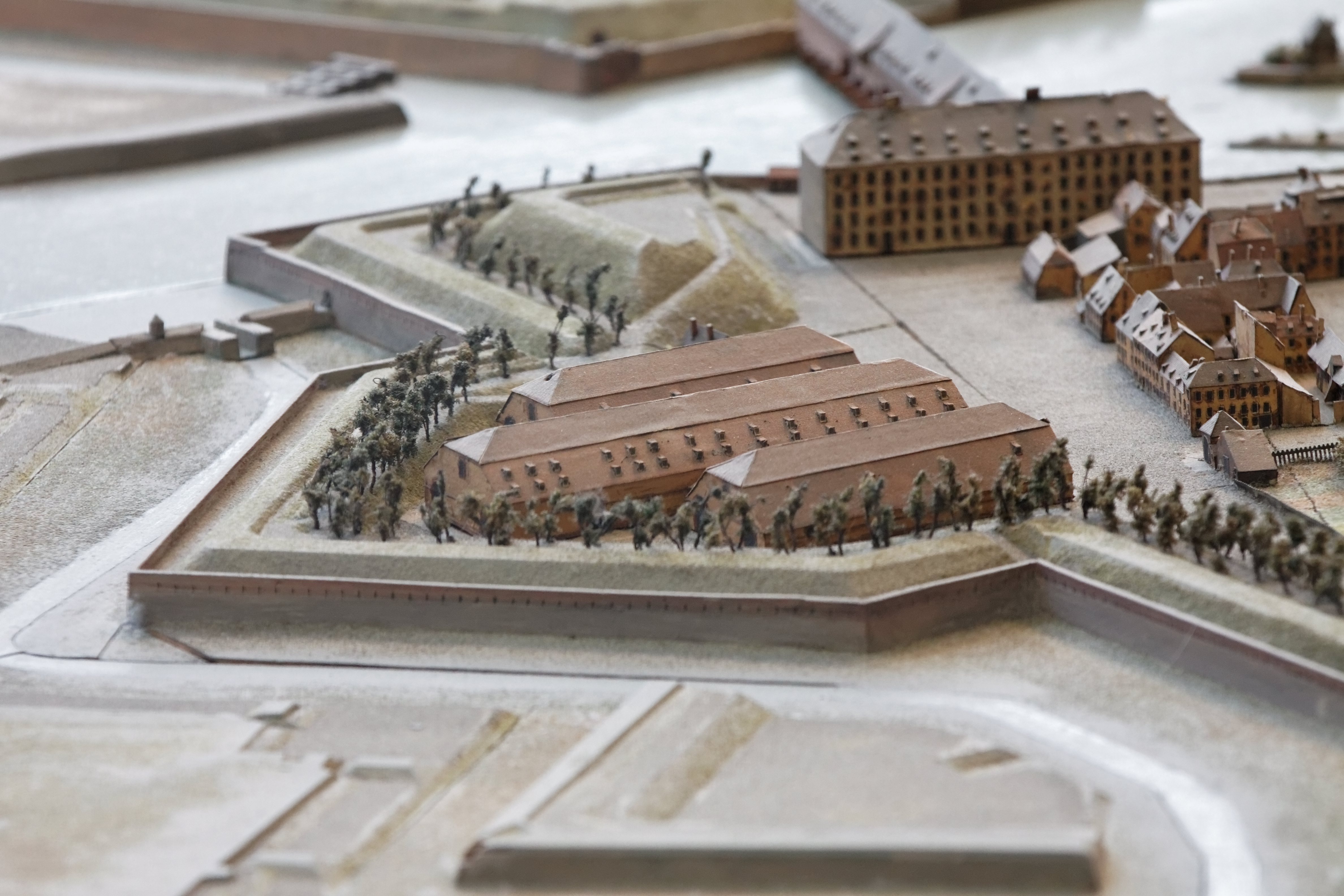 Plan-relief de Strasbourg en 1863. Plan-relief construit de 1830 à 1836 sous la direction de Boitard et actualisé de 1852 à 1863. Échelle 1/600e